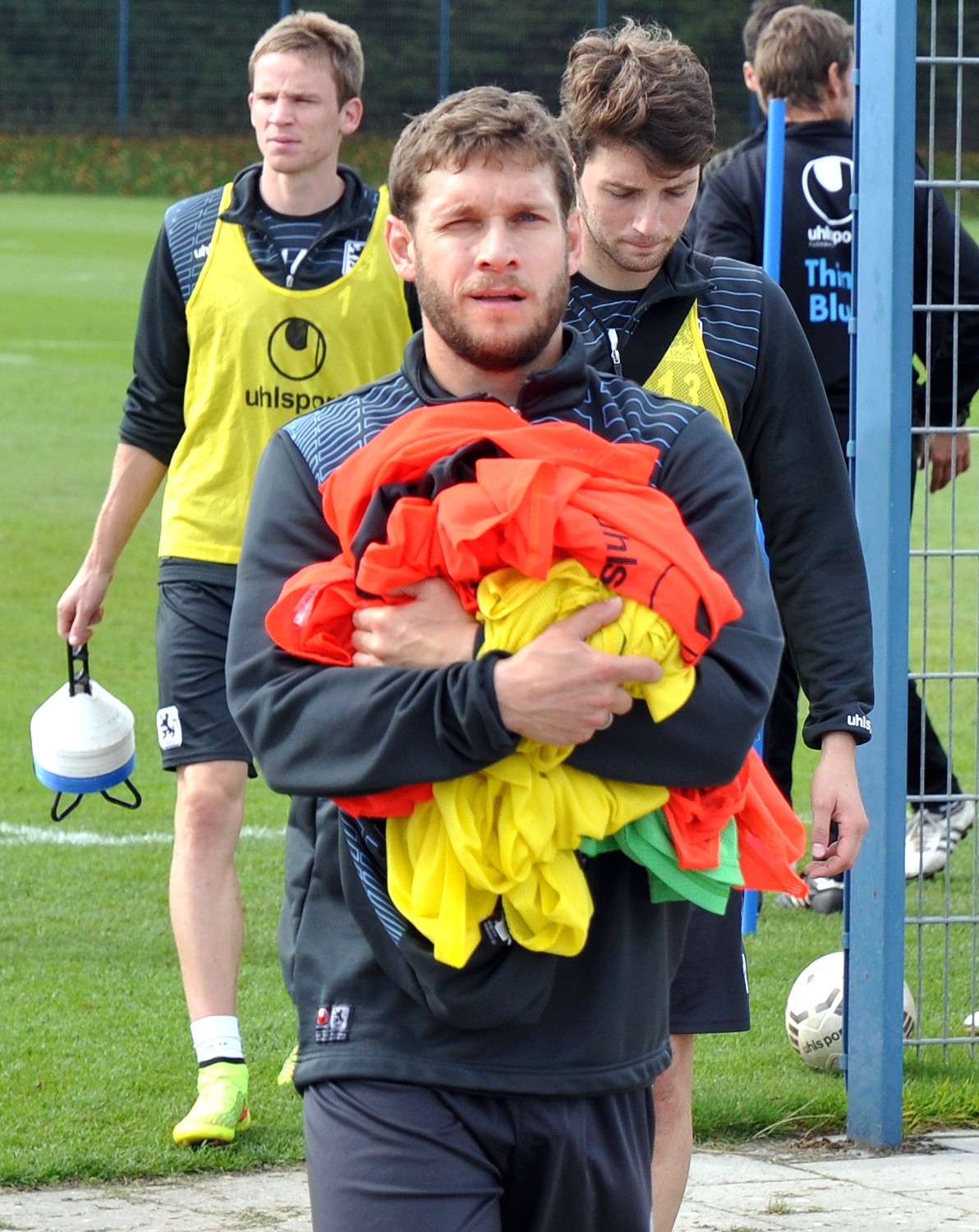 Moritz Volz